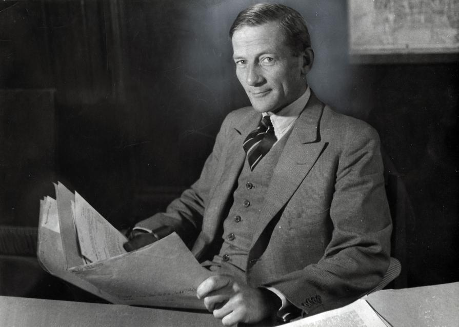 Schokking, W.F. (CHU). Wethouder Schokking (ziekenhuiswezen).